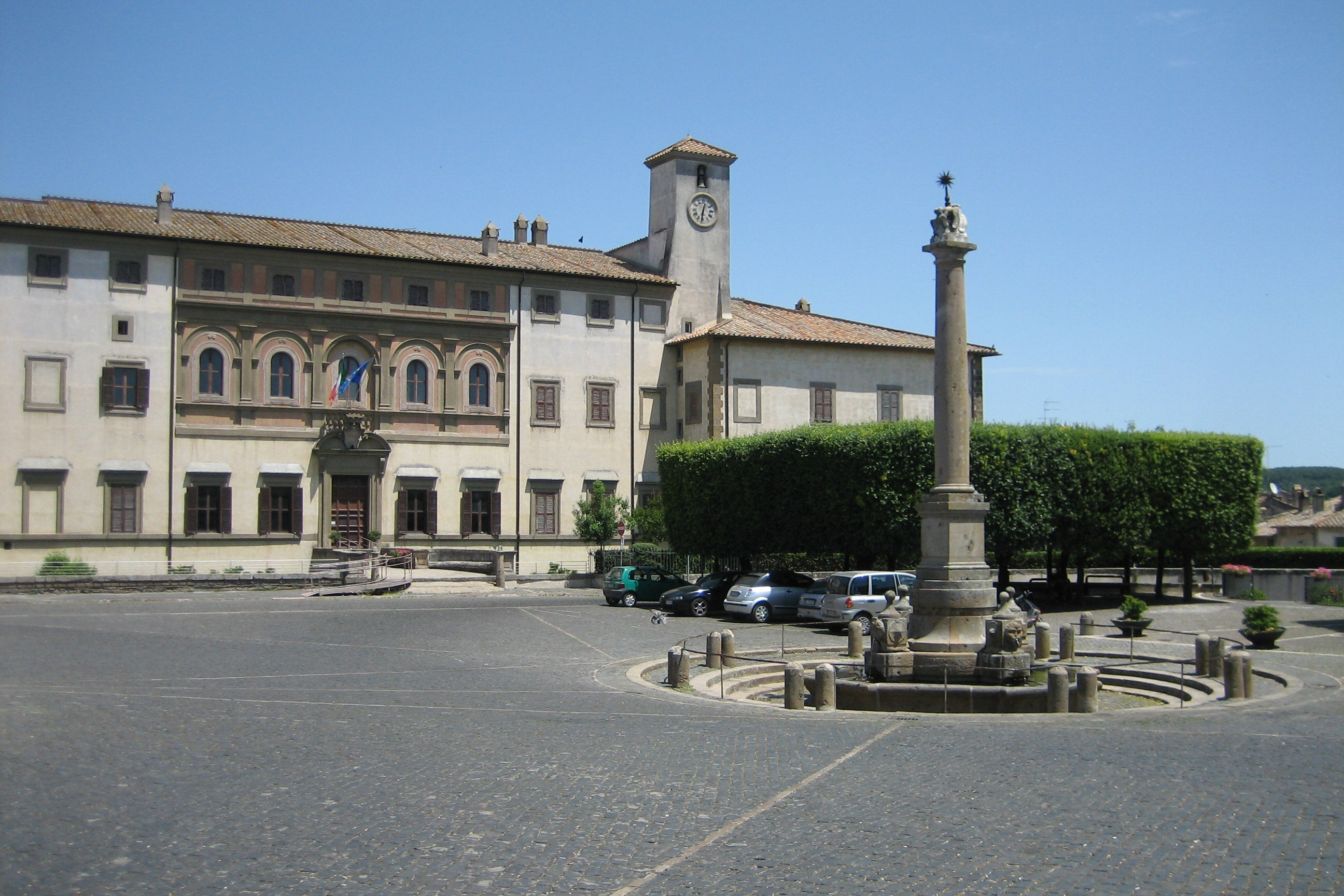 "Piazza Umberto I" with the "Palazzo Altieri" and the Fountain "Fontana delle Picche" in Oriolo Romano, Provincia di Viterbo, Italy